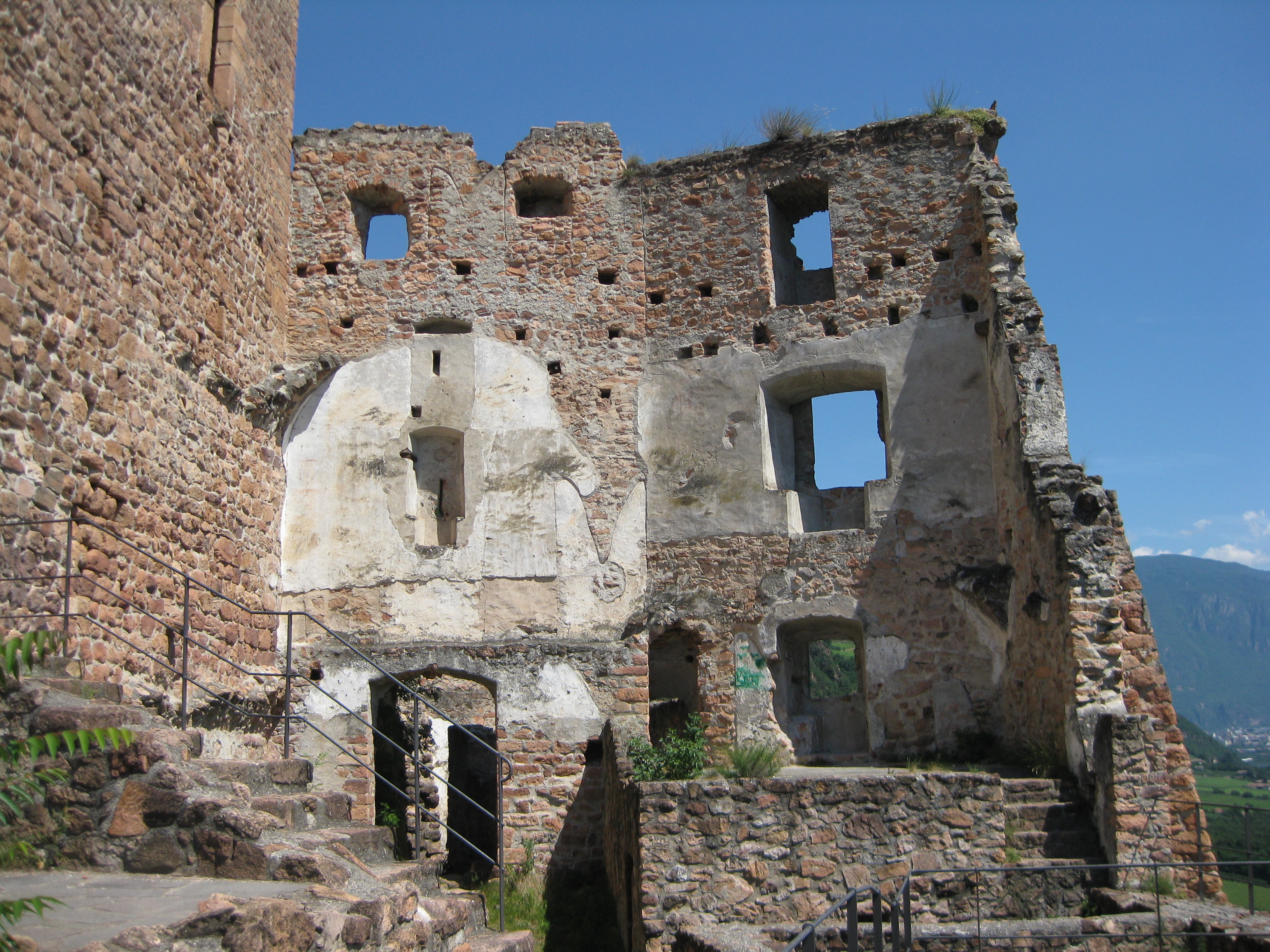 Burg Neuhaus